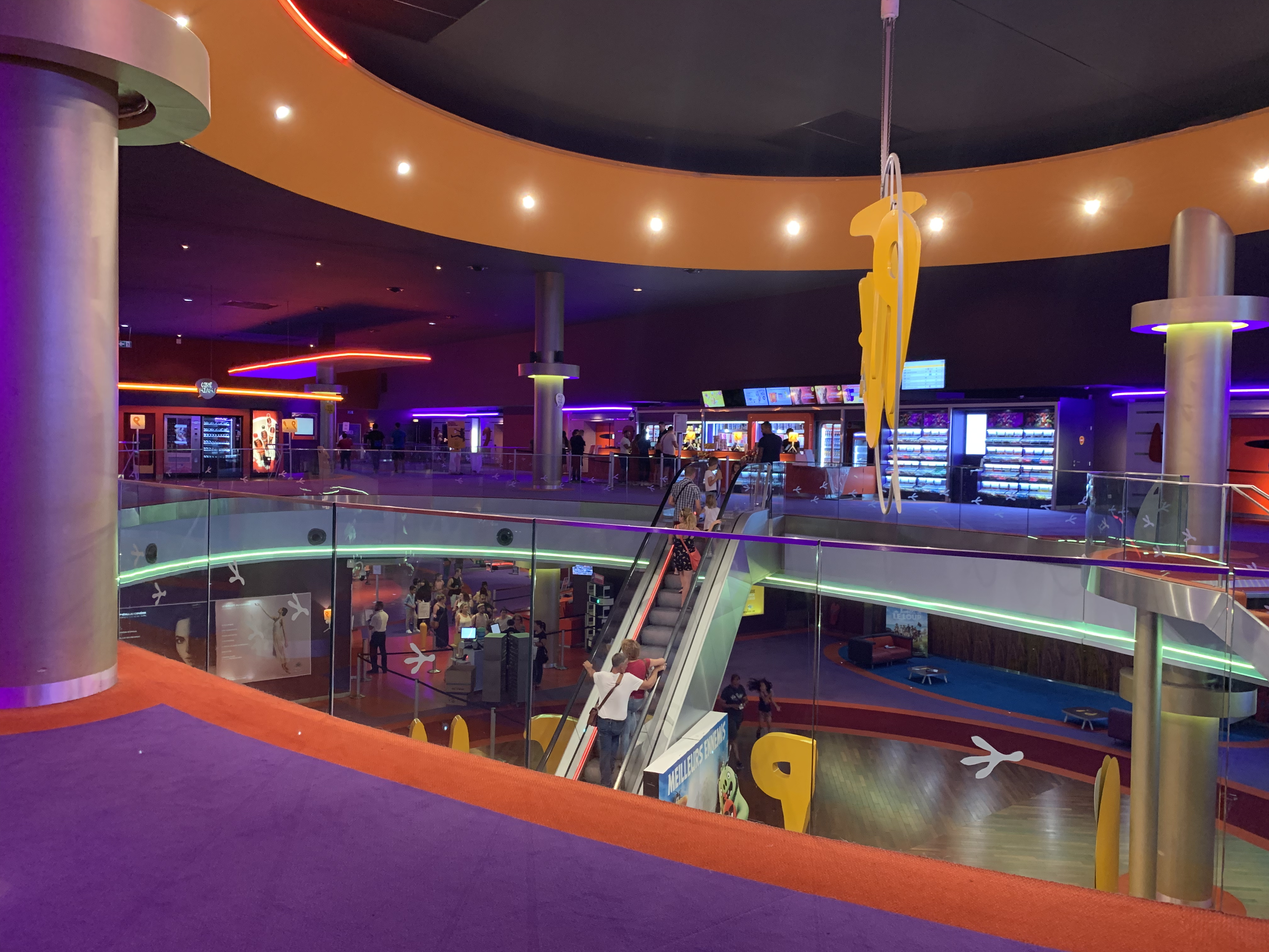 Vue intérieure du cinéma Pathé Carré de soie.